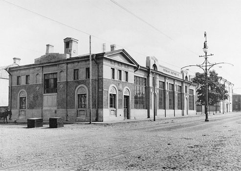 153. Рогожская подстанцiя городскихъ желЪзныхъ дорогъ на Б. Андроньевской ул. (Москва)